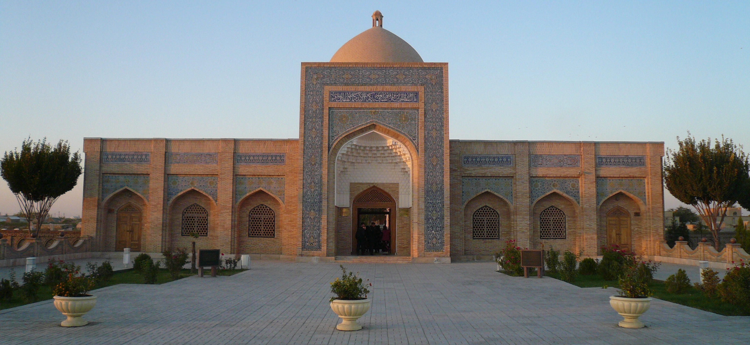 Некрополь Бахауддина Накшбанди. Бухара, Узбекистан